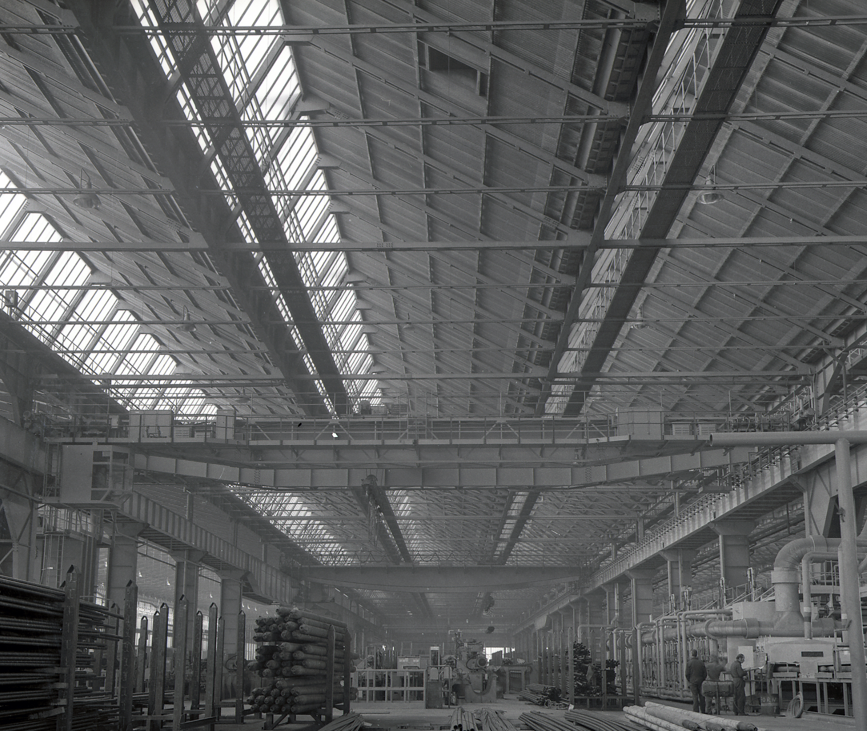 Acciaierie Falck di Arcore, scatto della fine degli anni '60 ad opera di Luigi Corini